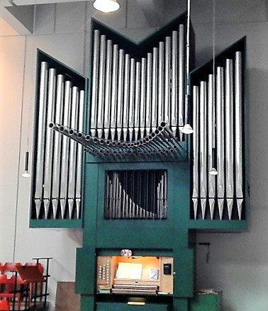 St. Birgitta (Unterhaching)